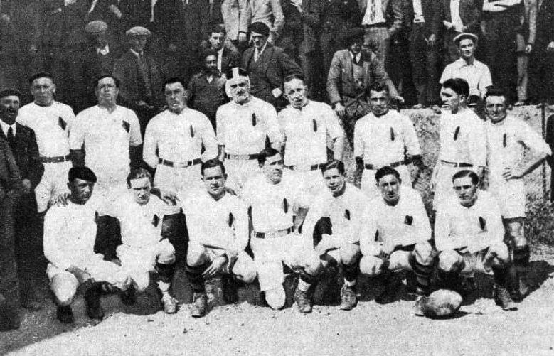 Le Racing Club de Narbonne, saison 1932-1933.